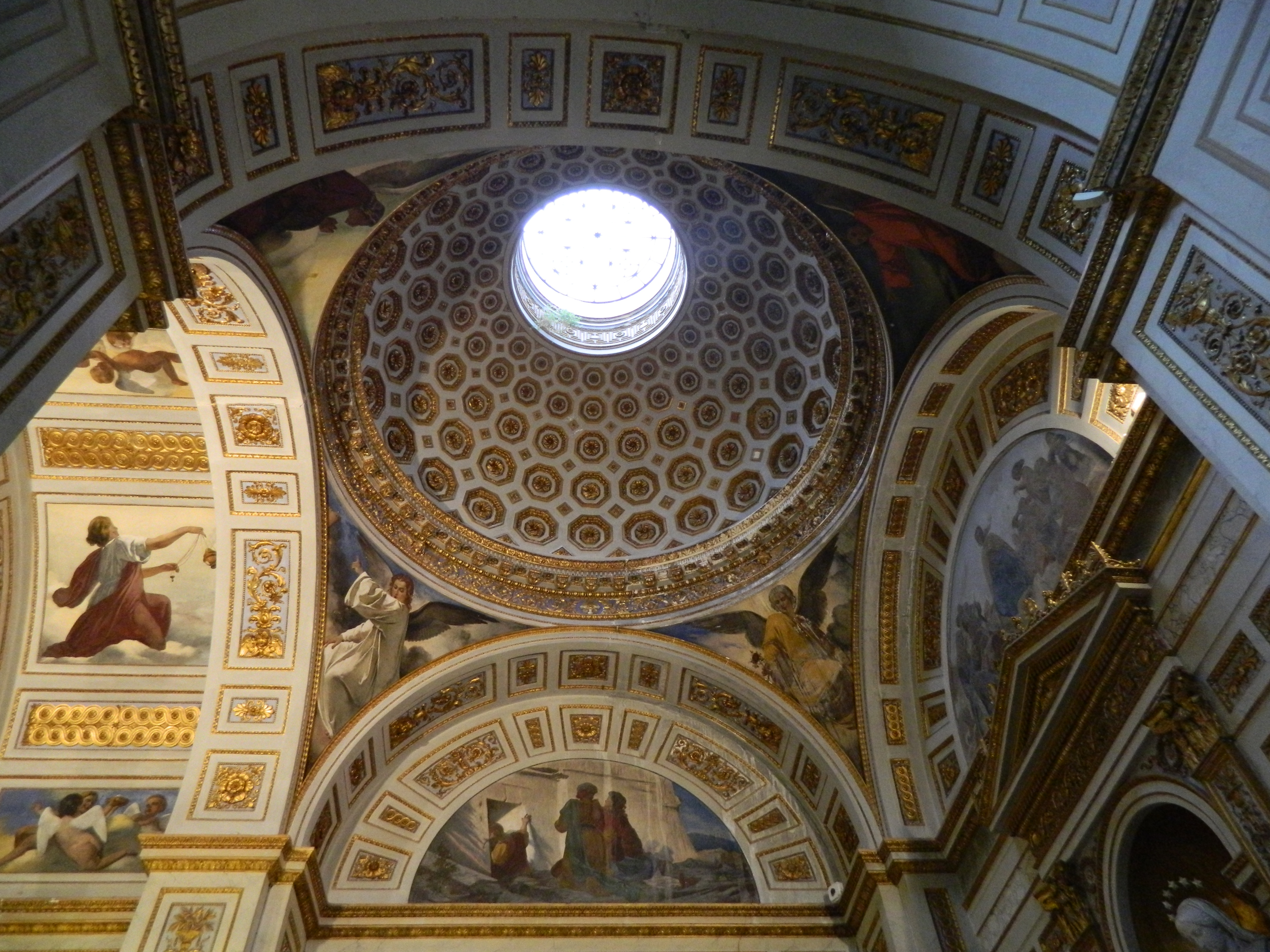 Cappella reale (Palazzo reale di Napoli) - Cupolino di una cappella della navata sinistra